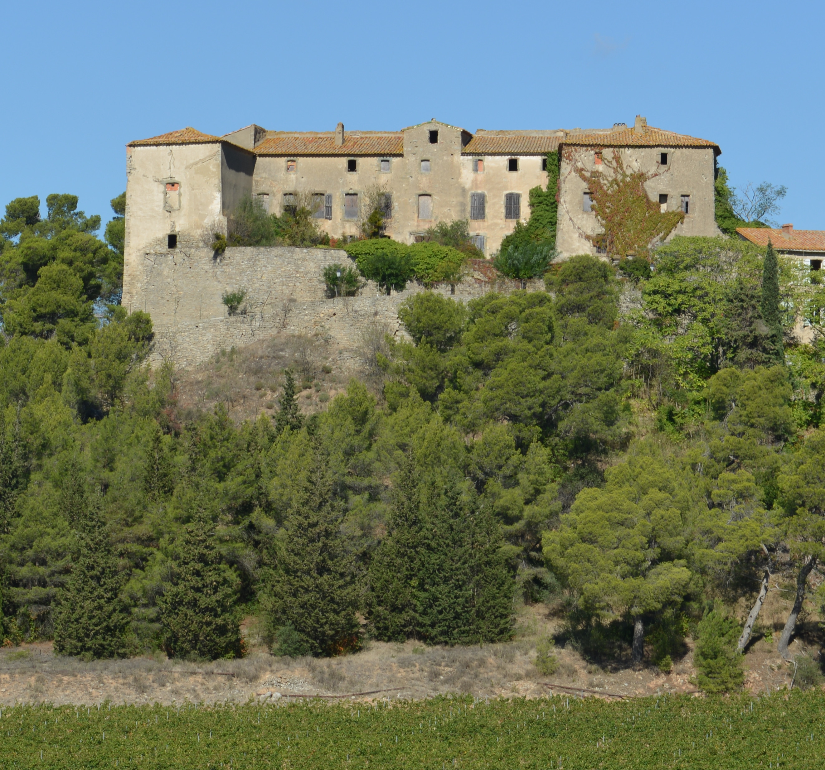 Château de Beaufort (CP 34210, Languedoc-Roussillon)